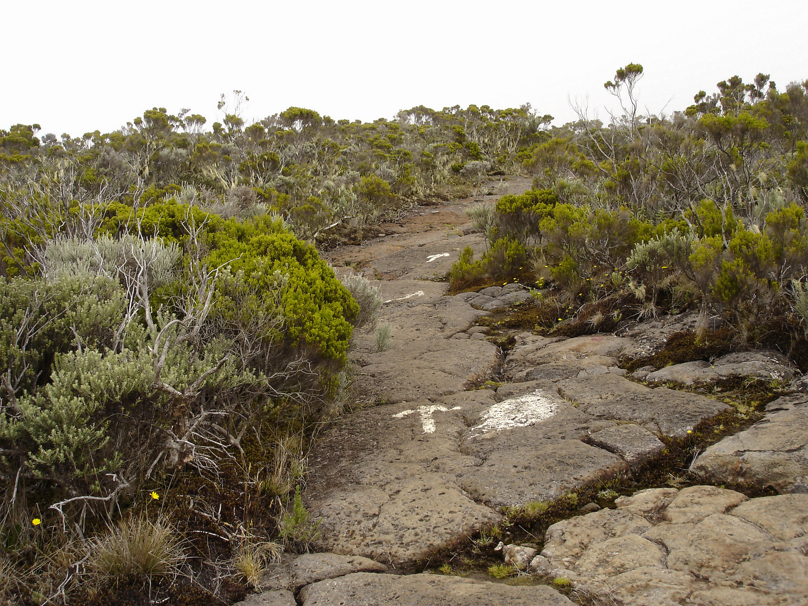 Description: Sentier menant à la Roche Ecrite, novembre 2004, Saint-Denis de la Réunion Source:Bouba